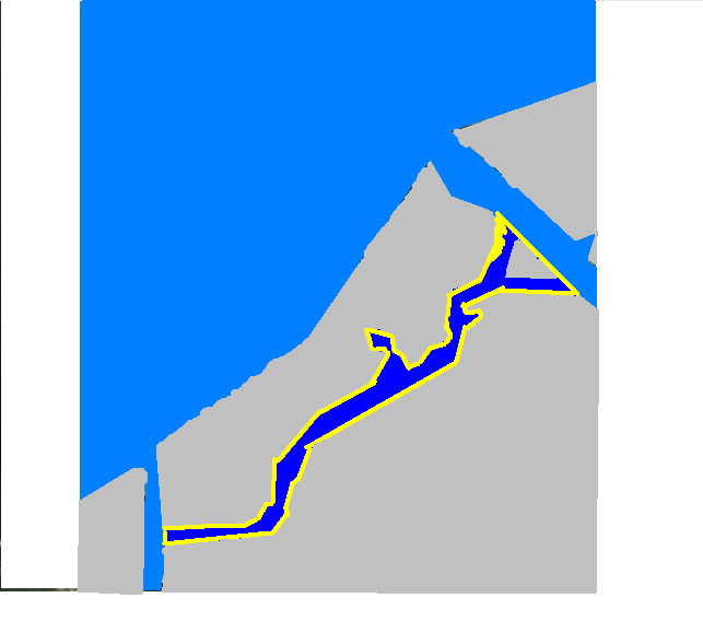 Булльупе